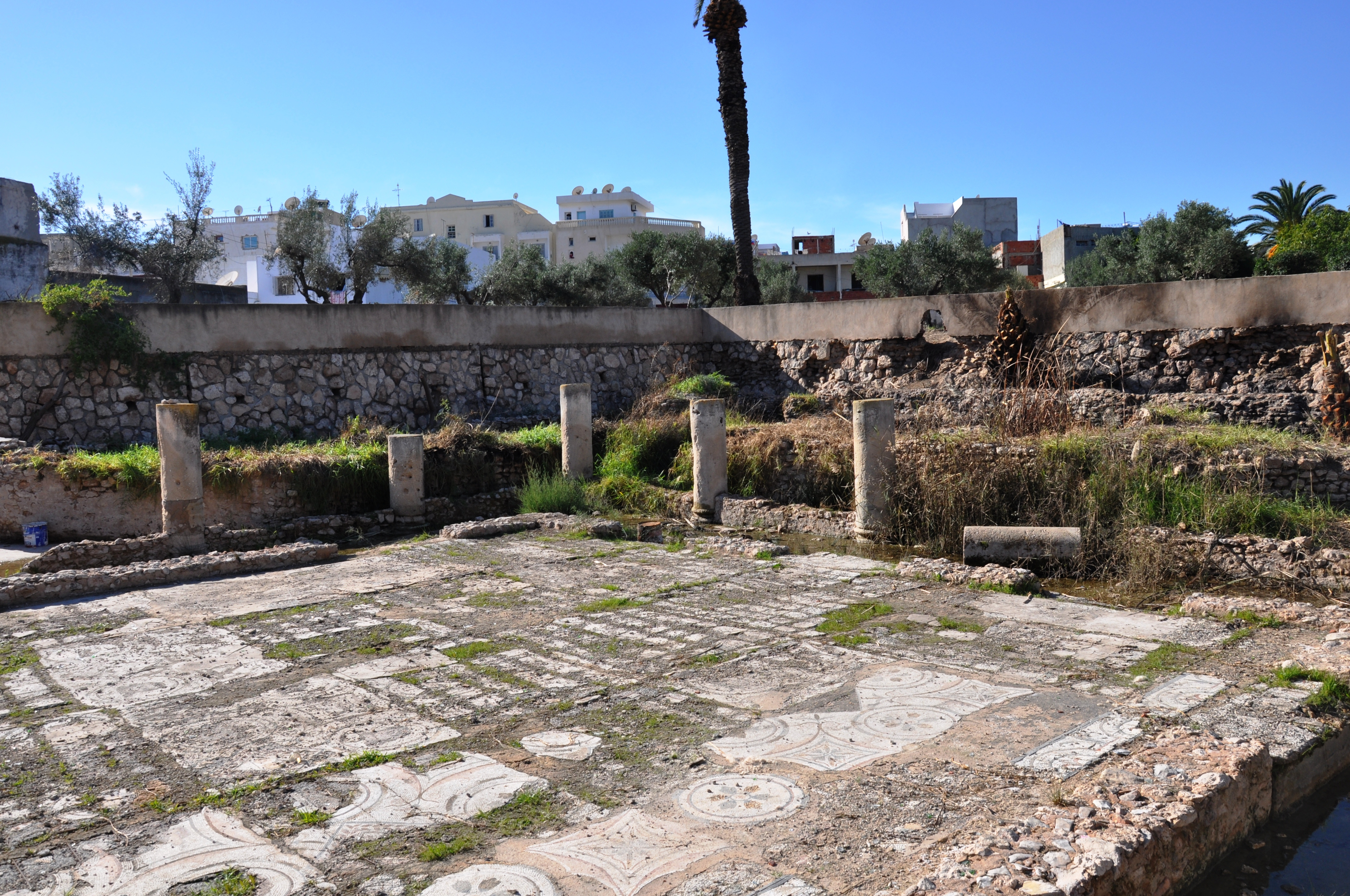 Maison romaine de la redoute des chasseurs